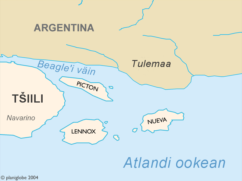 Picton, Lennox ja Nueva